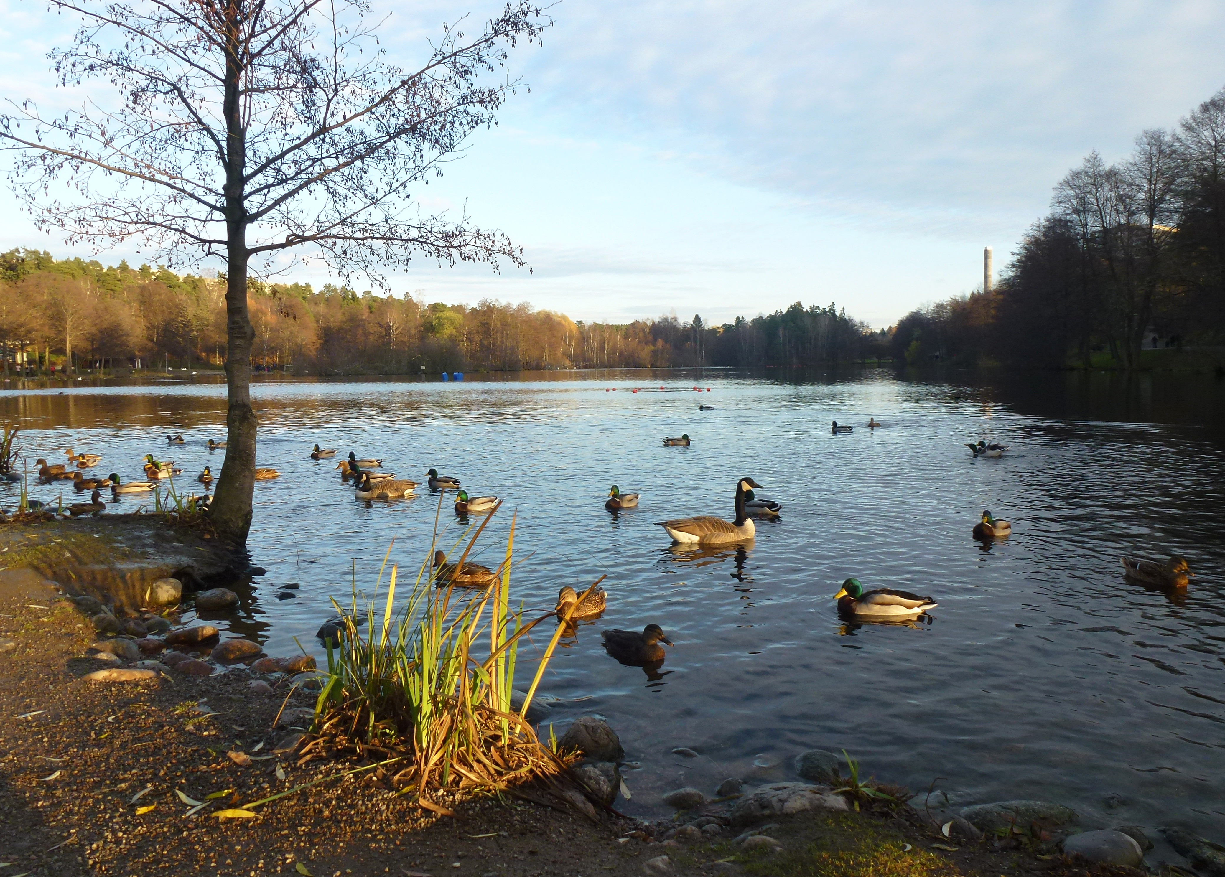 Lötsjön, vy mot öst